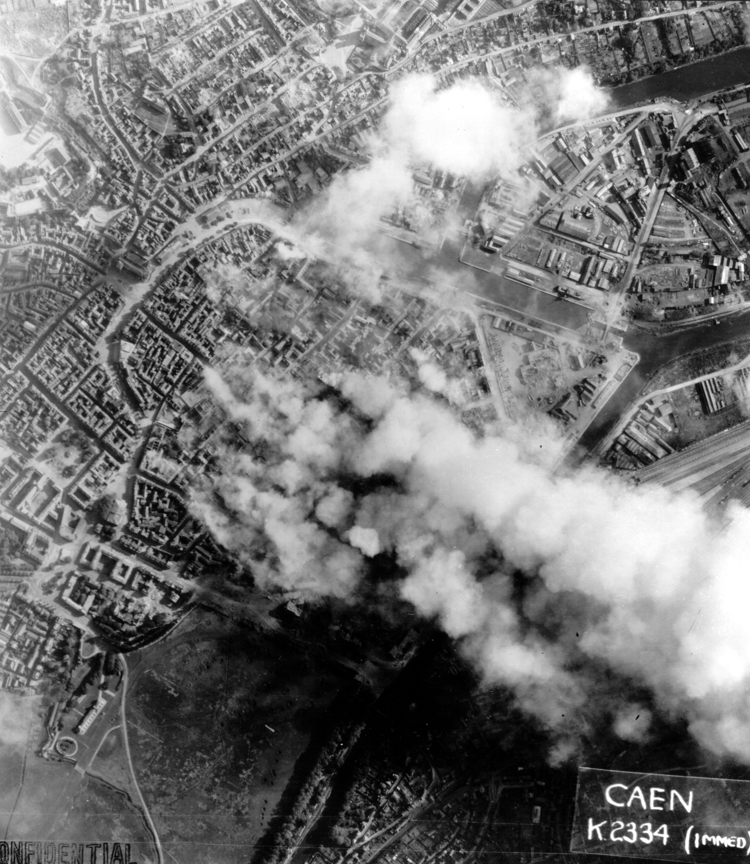 Vue aérienne des bombardement sur la région de Caen.